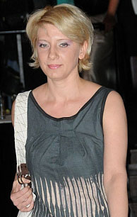 Ганна Турчинова